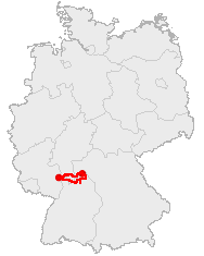 Course Map of Nibelungen-Siegfriedstrasse